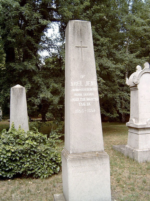 Ábel Jenő sírja Budapesten, Kerepesi temető: 34/2-1-51